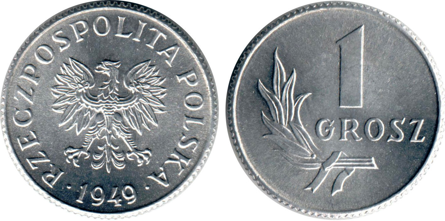 1 grosz 1949